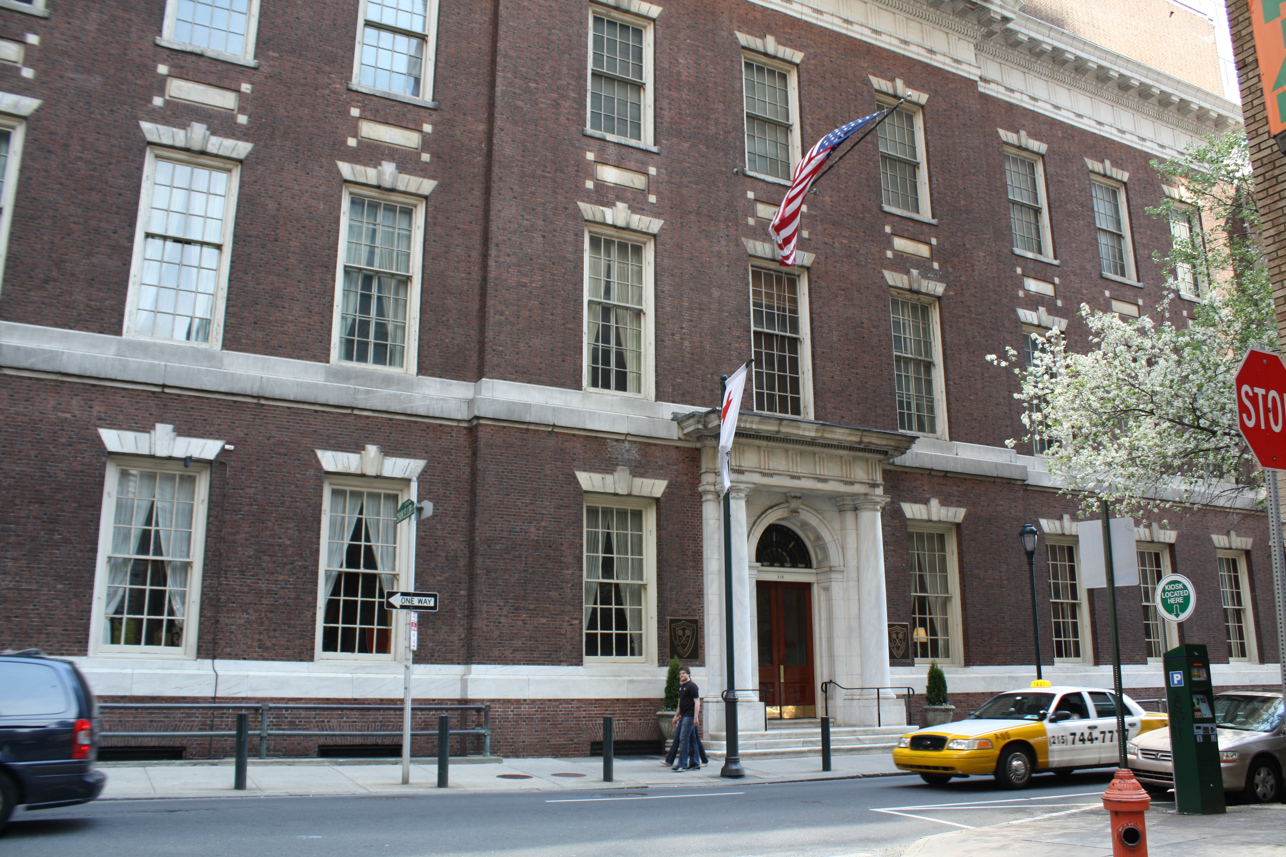 Philadelphia Racquet Club in Philadelphia, PA